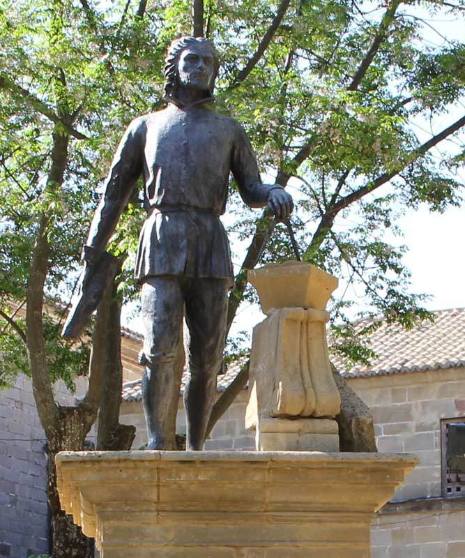 Statue d'André de Vandelvira à Ubeda